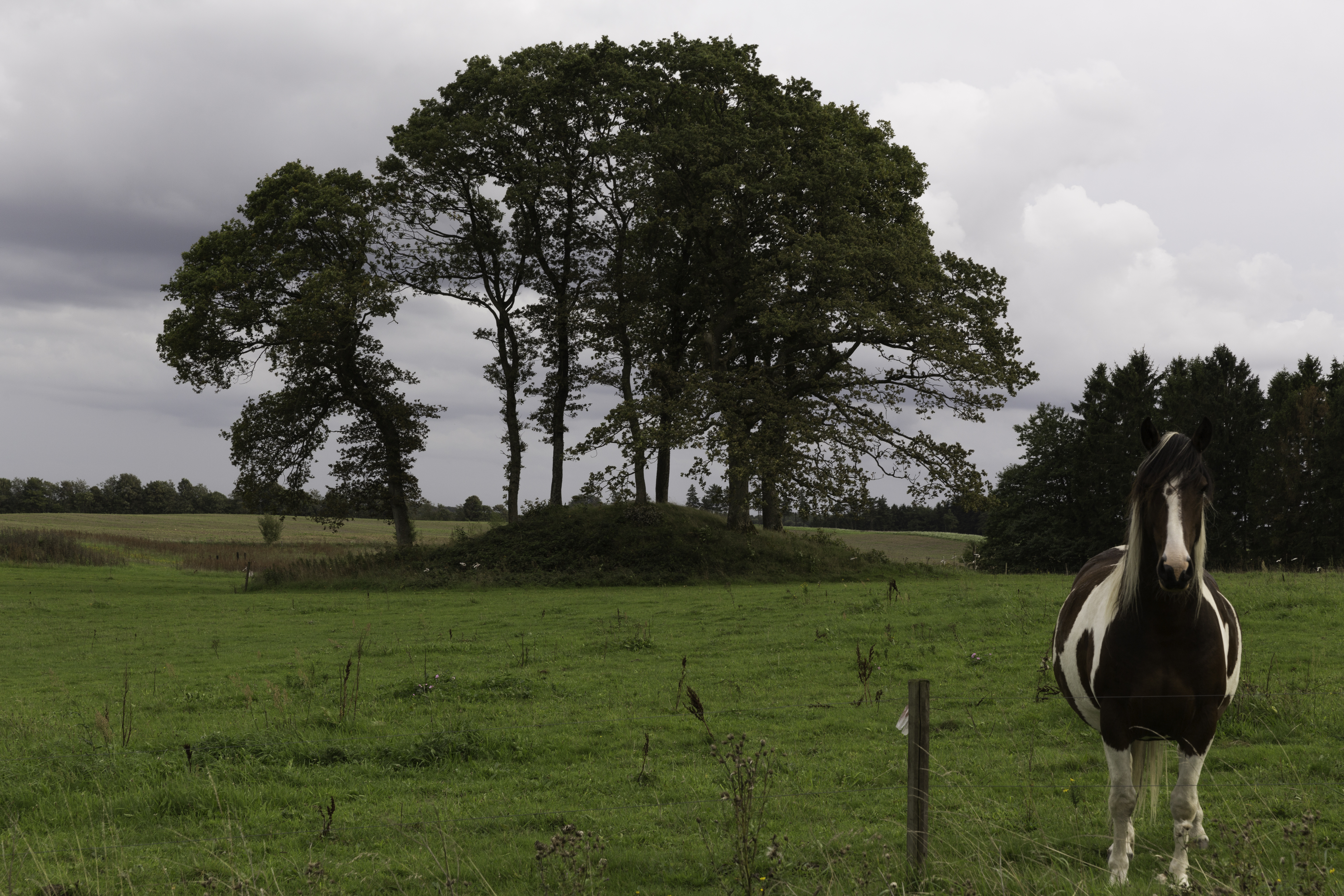 Nørre Snede gravhøj 54075